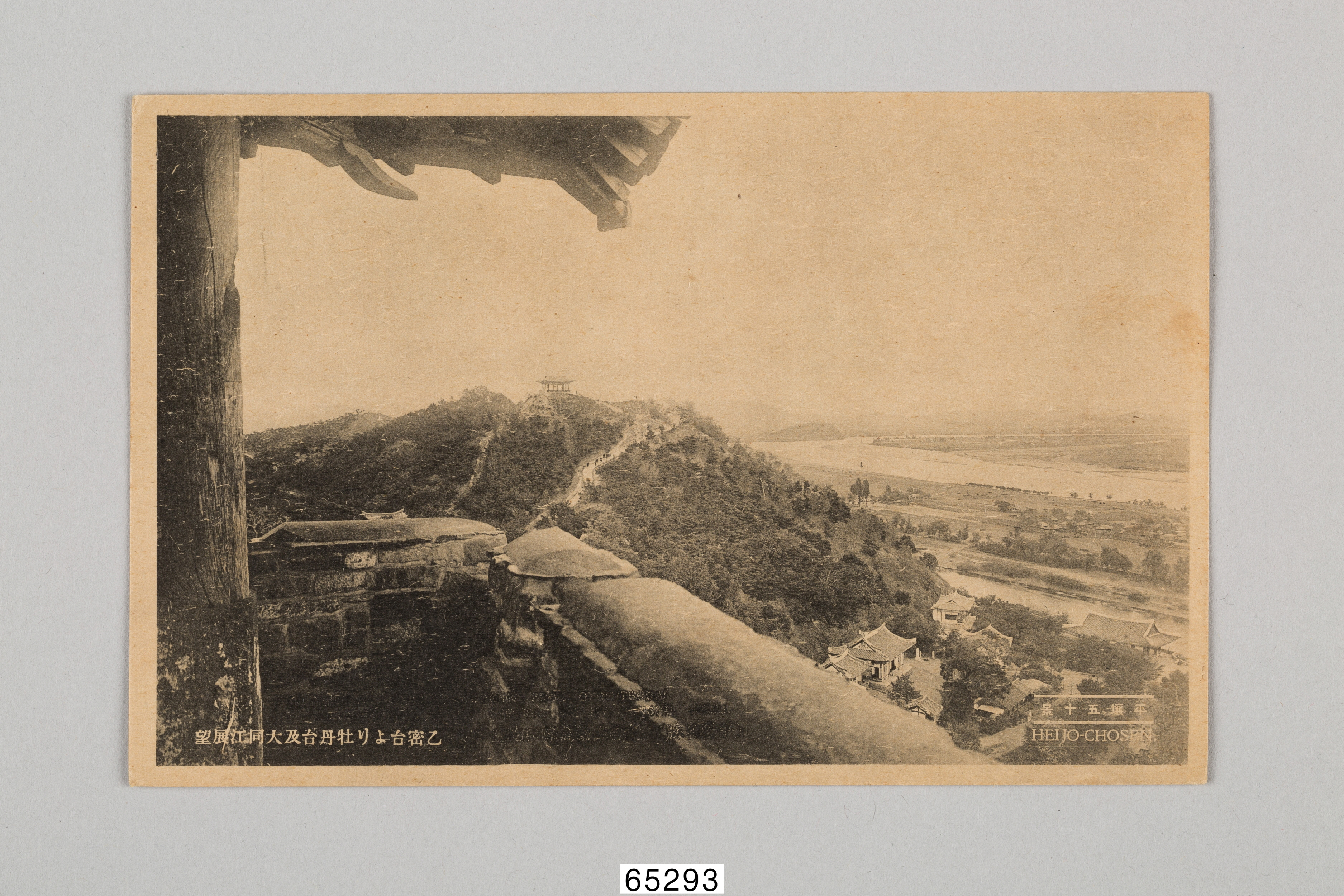 평양의 풍경이 인쇄된 엽서. Taisho Hato 발행. 앞면에 평양 을밀대에서 바라본 대동강 전경을 담은 흑백사진이 인쇄됨. 좌측 하단에는 '乙密台より牡丹台及大同江展望'이, 우측 하단에는 '平壤五十景'과 'HEI JO-CHOSEN.'이 인쇄됨. 뒷면에 우표부착란, 내용기입란, 'MADE IN WAKAYAMA' 등이 인쇄되고, 일부인(日附印)이 찍혀짐.